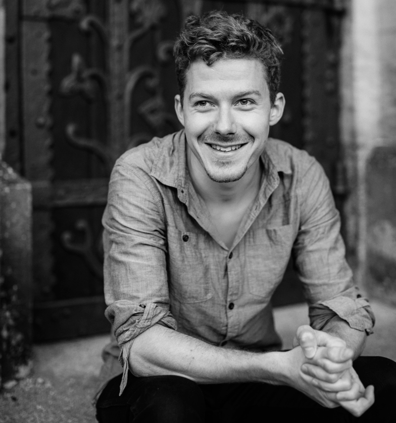 Foto: Sandra Ludewig